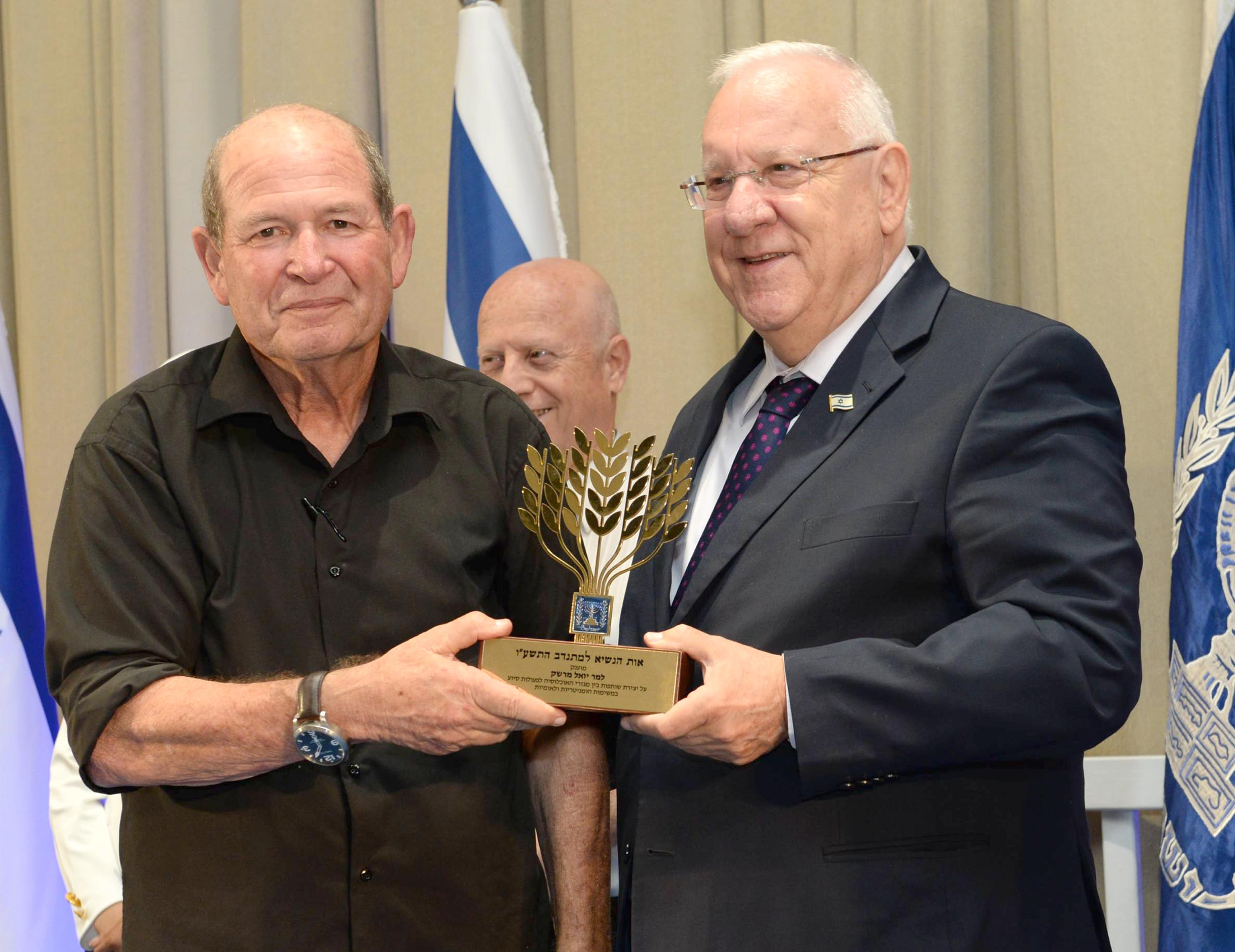 נשיא מדינת ישראל ראובן ריבלין מעניק את אות הנשיא למתנדב לשנת תשע"ו באירוע חגיגי בבית הנשיא ליואל מרשק